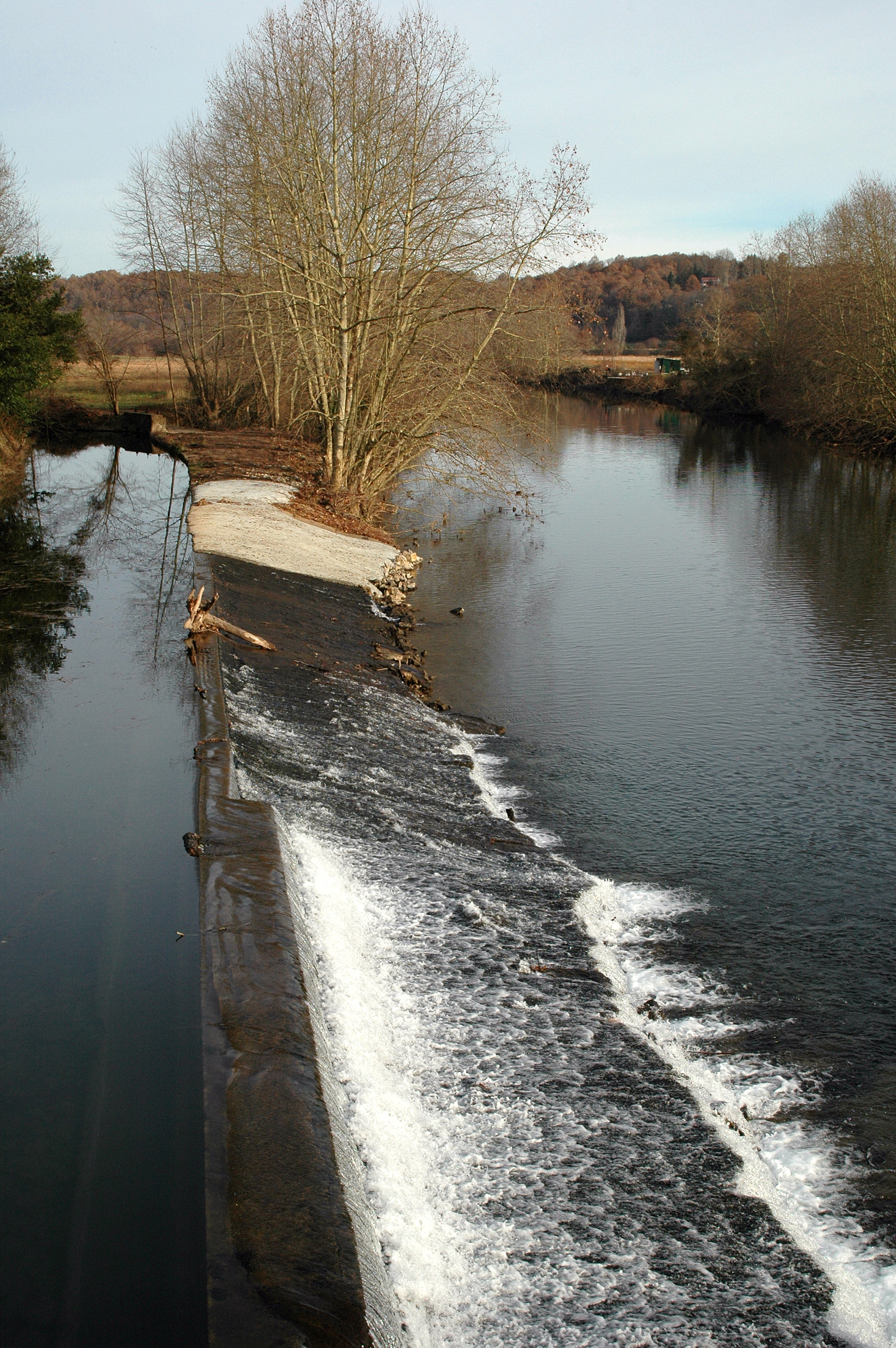 Ustaritz, barrage sur la Nive. Photo prise le 31/12/06 par Harrieta171